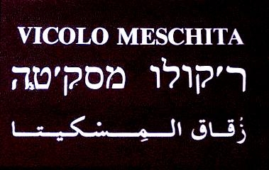 Iscrizione trilingue (italiano, arabo ed ebraico) nel "Vicolo Meschita" a Palermo.